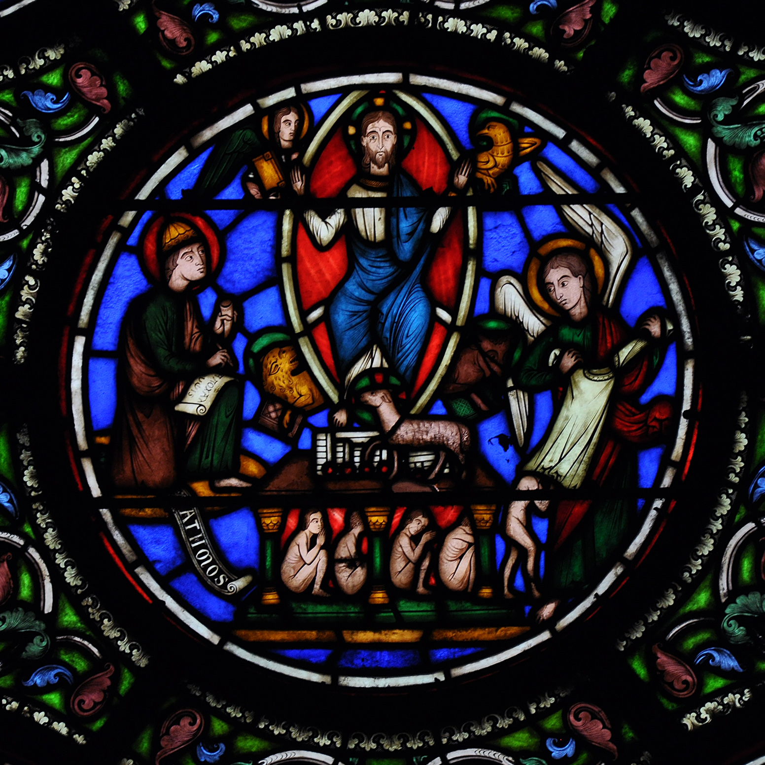 Vitrail de la Basilique Saint-Denis (chapelle Saint Cucuphas).Vitrail de l'Apocalypse: Jean à Patmos. Viollet-le-Duc et Alfred Gérente, 1854.